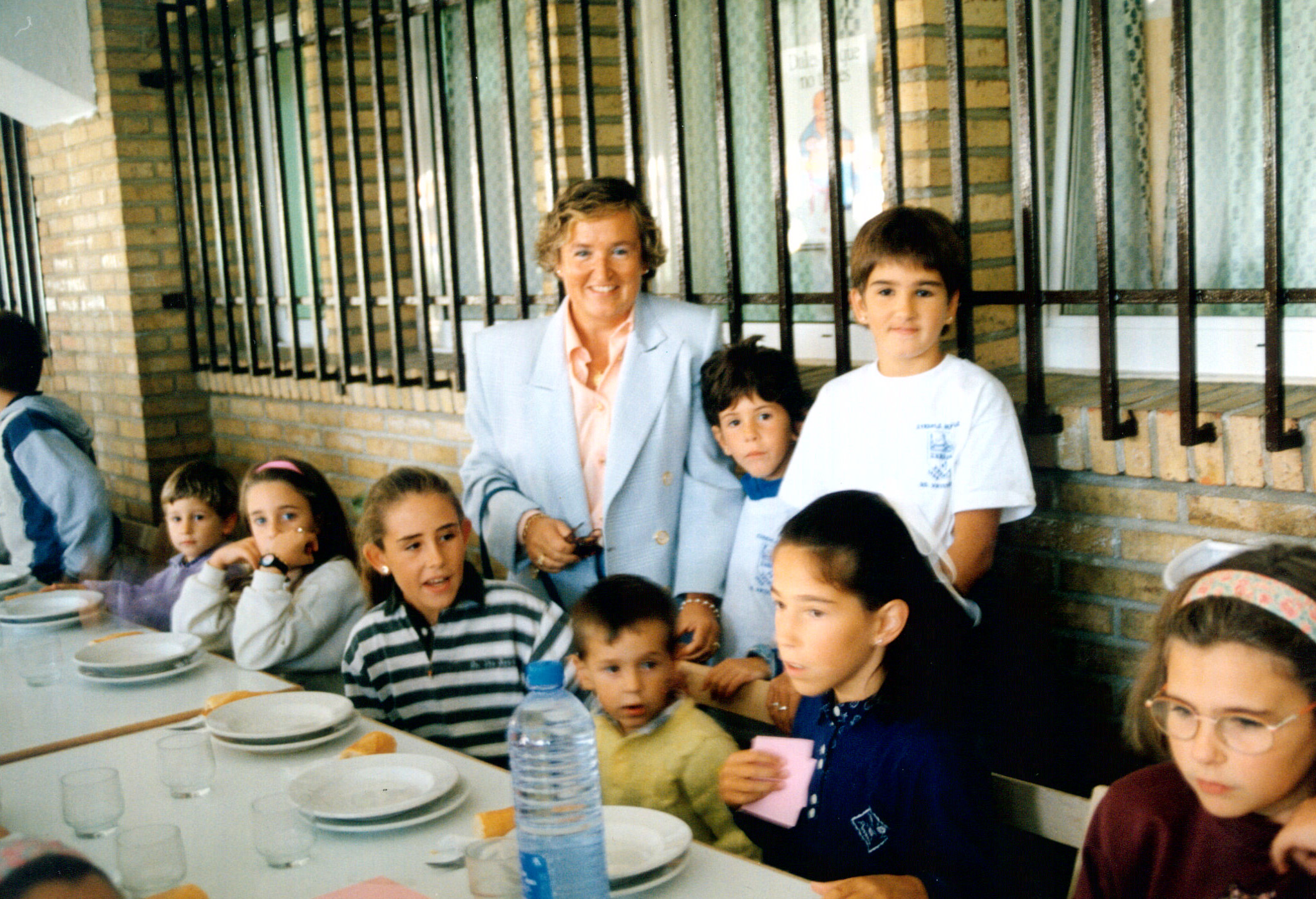 Kontxita Beitia - maistra aitzindaria ikasleekin